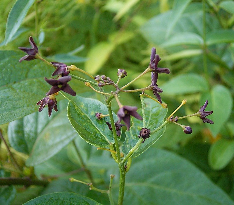 Vincetoxicum nigrum